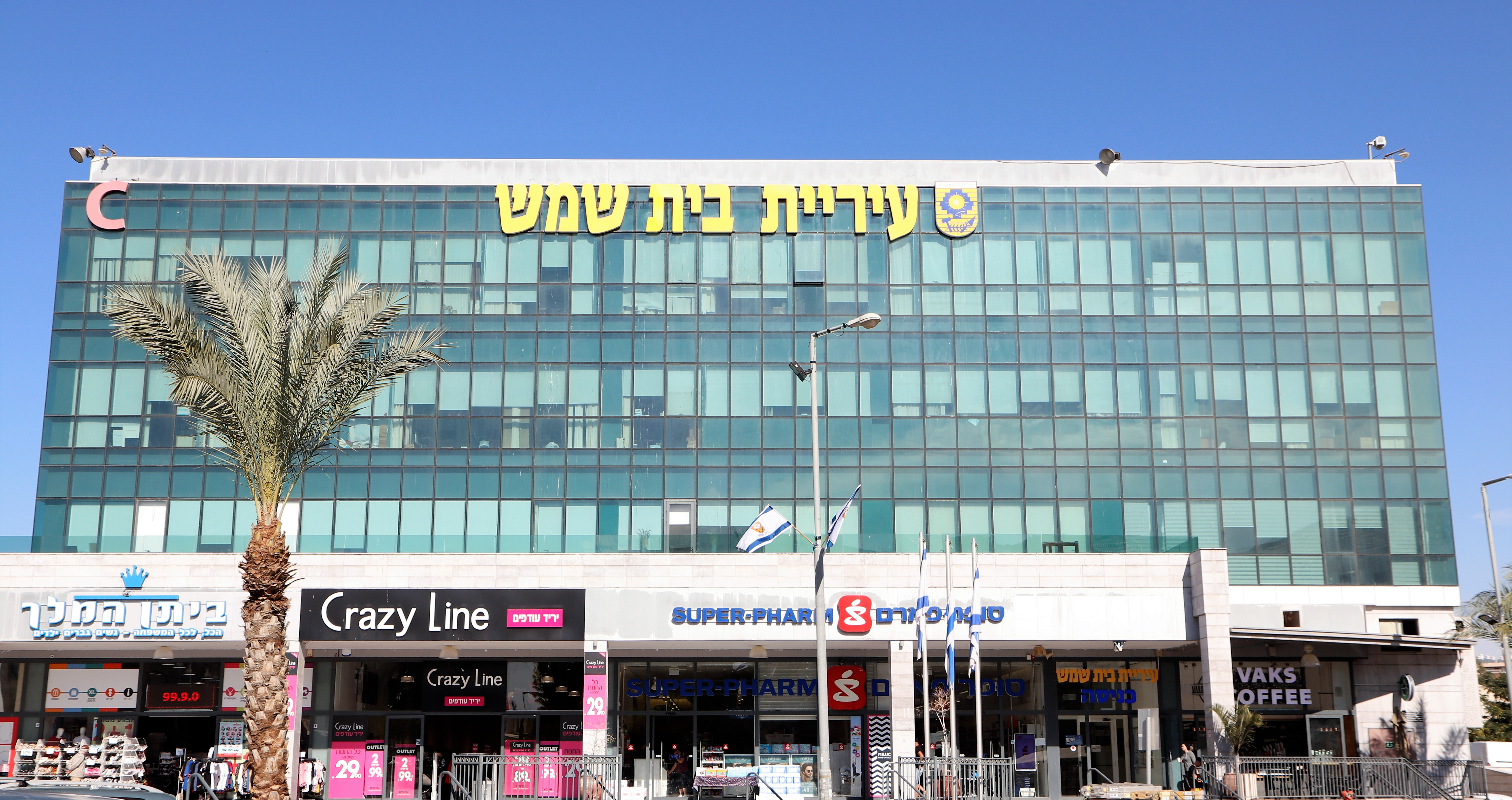 בניין עיריית בית שמש